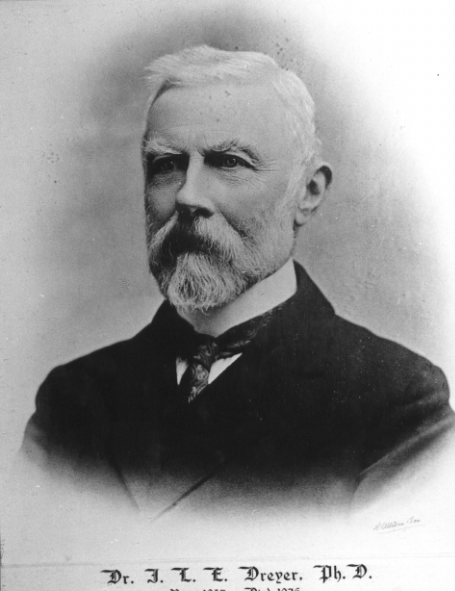 Дрейер Джон Людвиг Эмиль